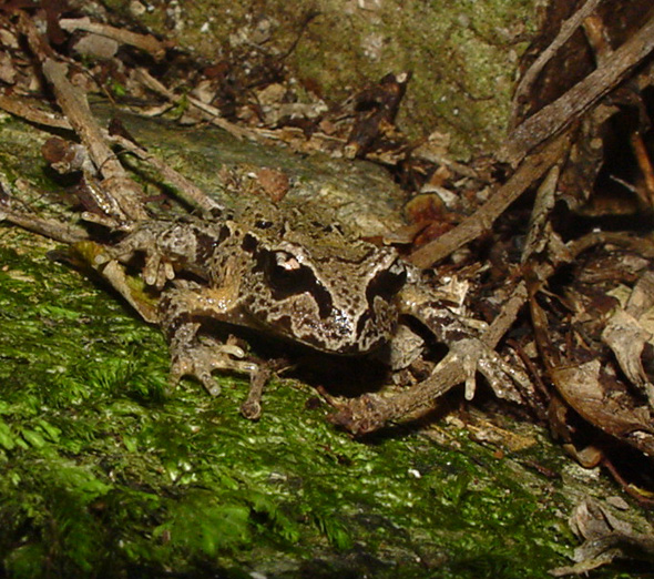 Leiopelma hamiltoni